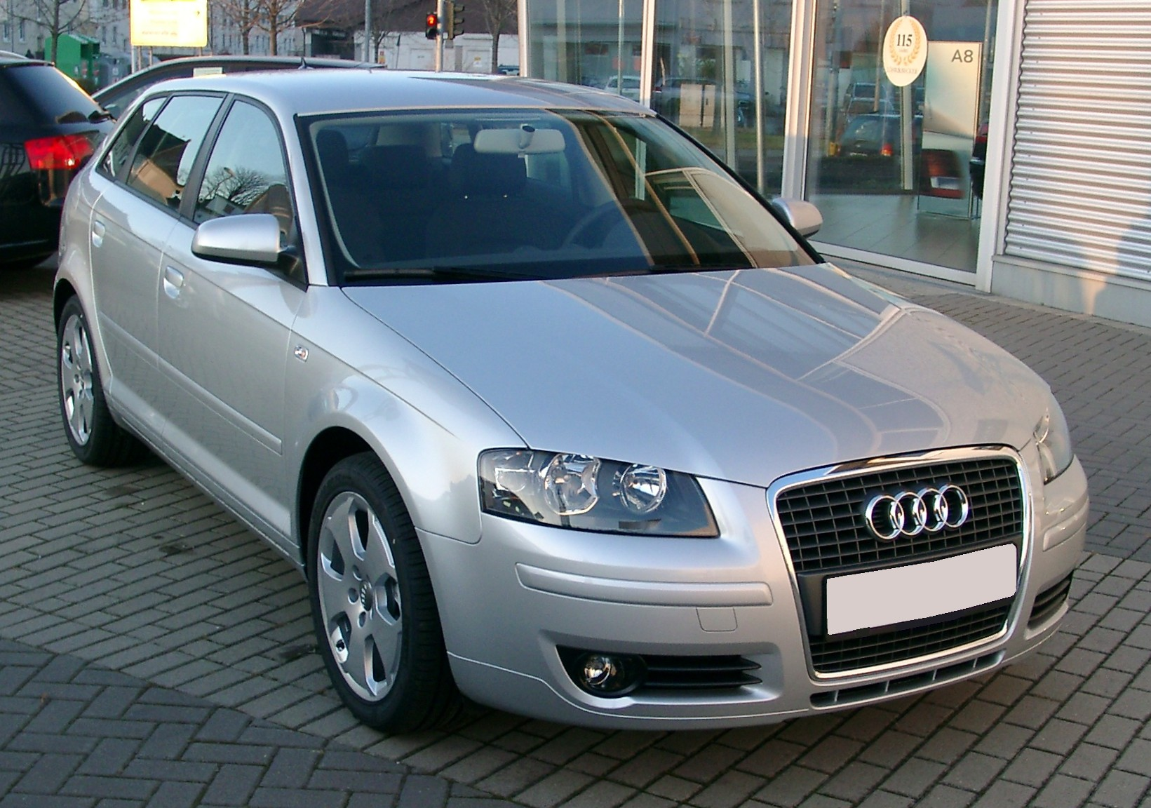 Audi A3